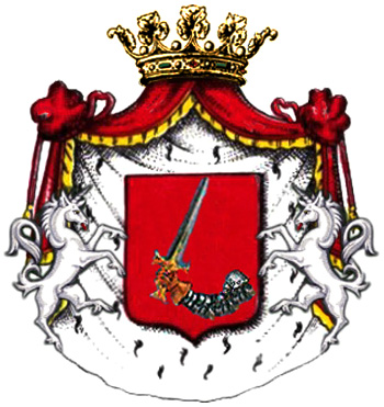 Stemma della famiglia Spadafora.